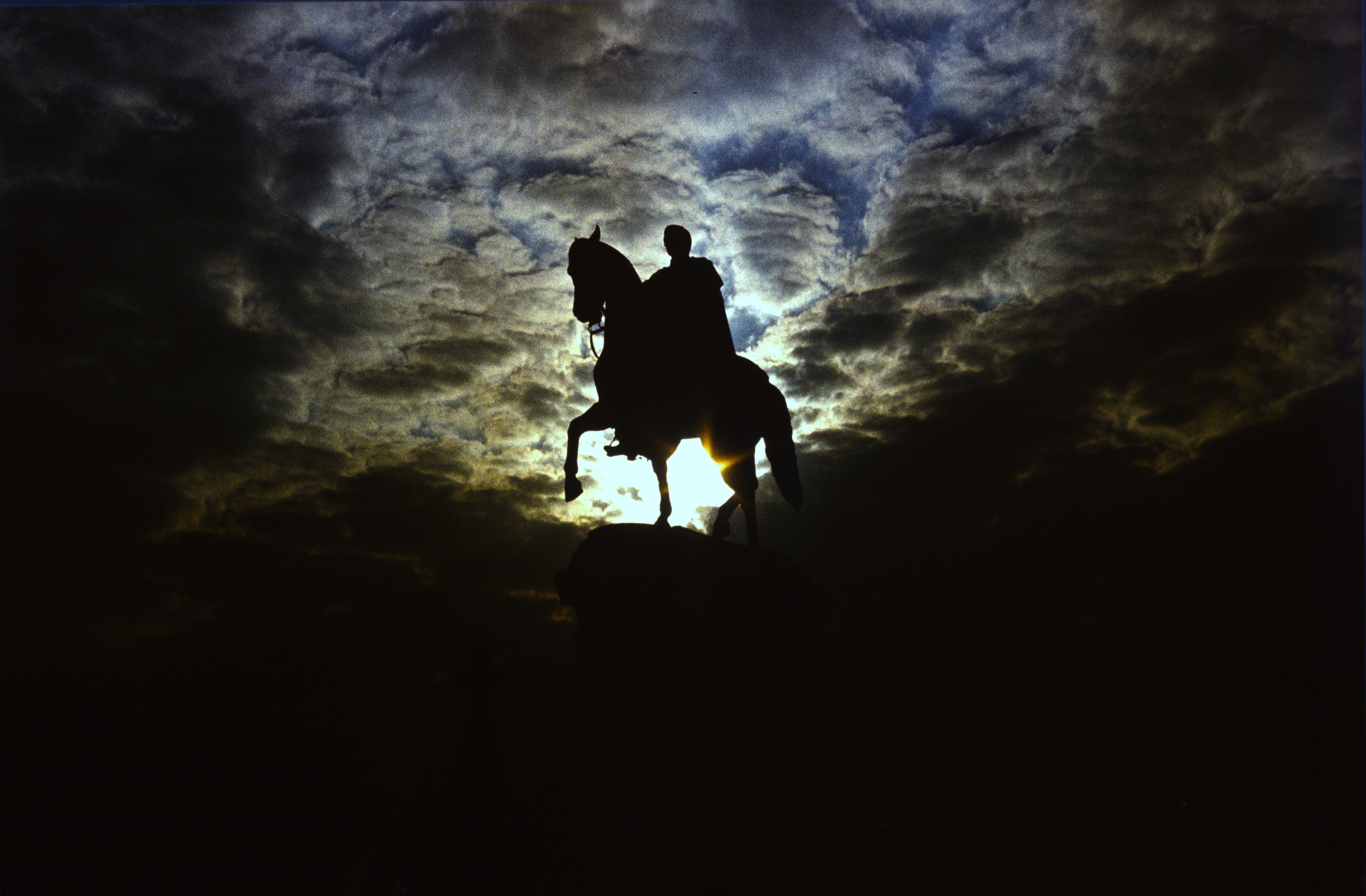 König Johanns von Johannes Schilling geschaffenes Reiterstandbild auf dem Theaterplatz in Dresden, Juni 1977.